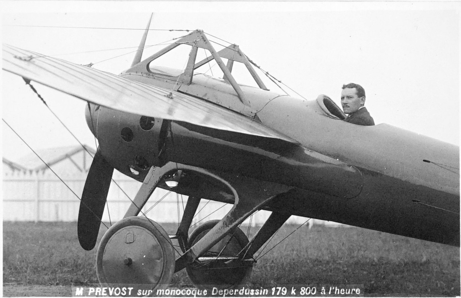 en 1913 lors d ela Grande Semaine d'Aviation de la Champagne.